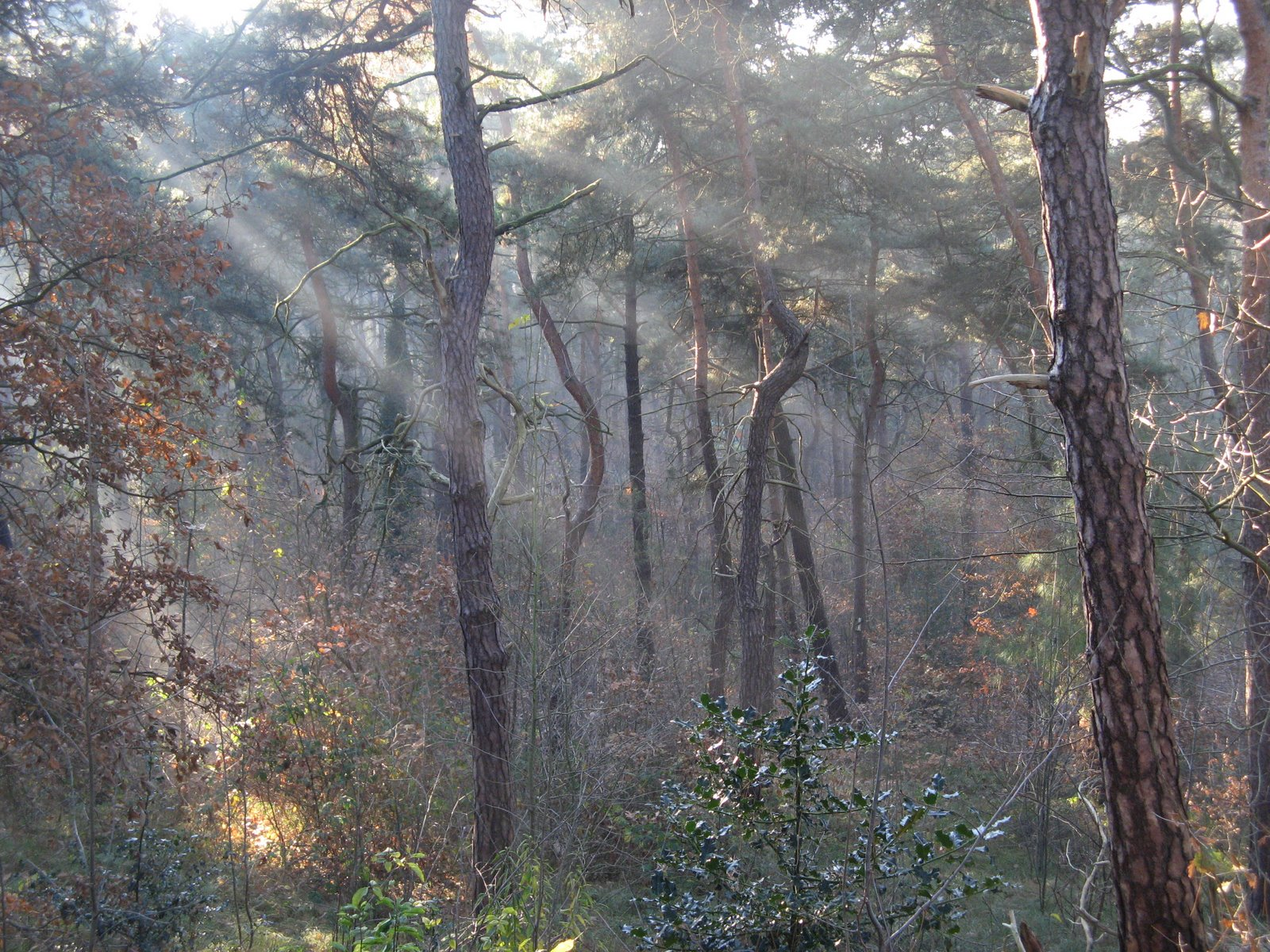 Bossen, Kasterlee, Belgium